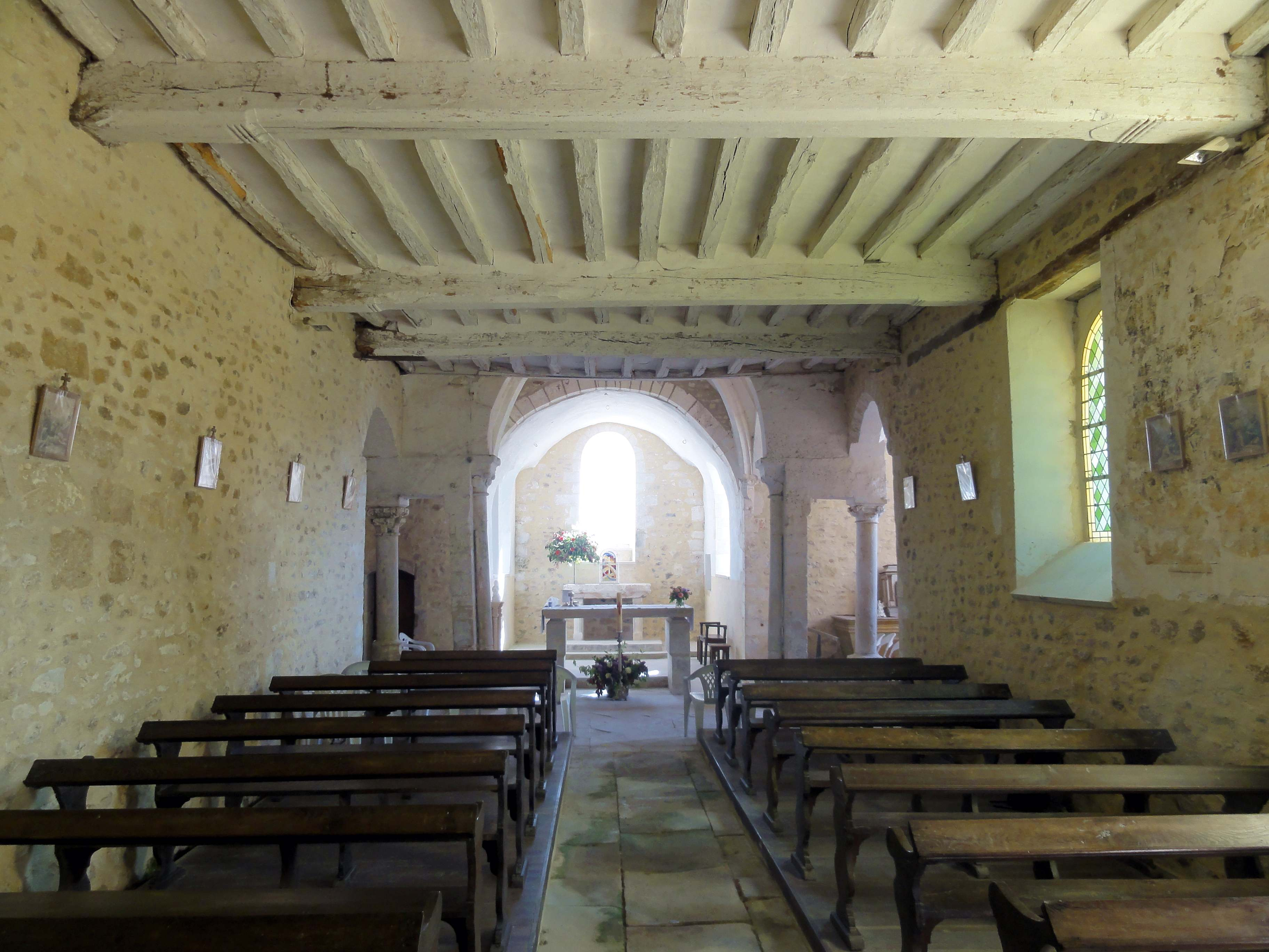 Intérieur de l'église - voir tire.